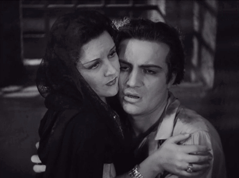 Scena del film Tosca (1941) di Jean Renoir, poi Carl Koch